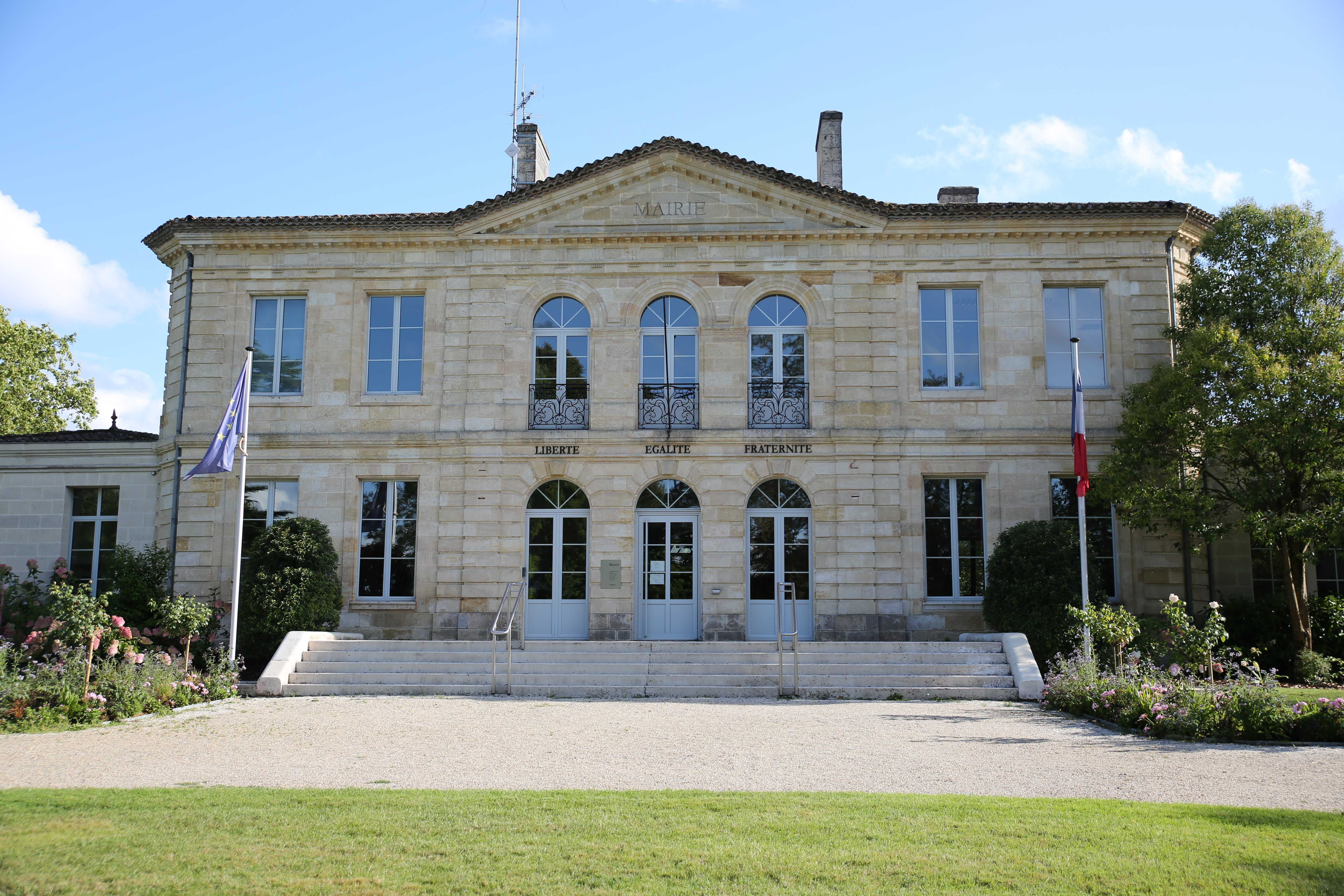 Mairie de Blanquefort